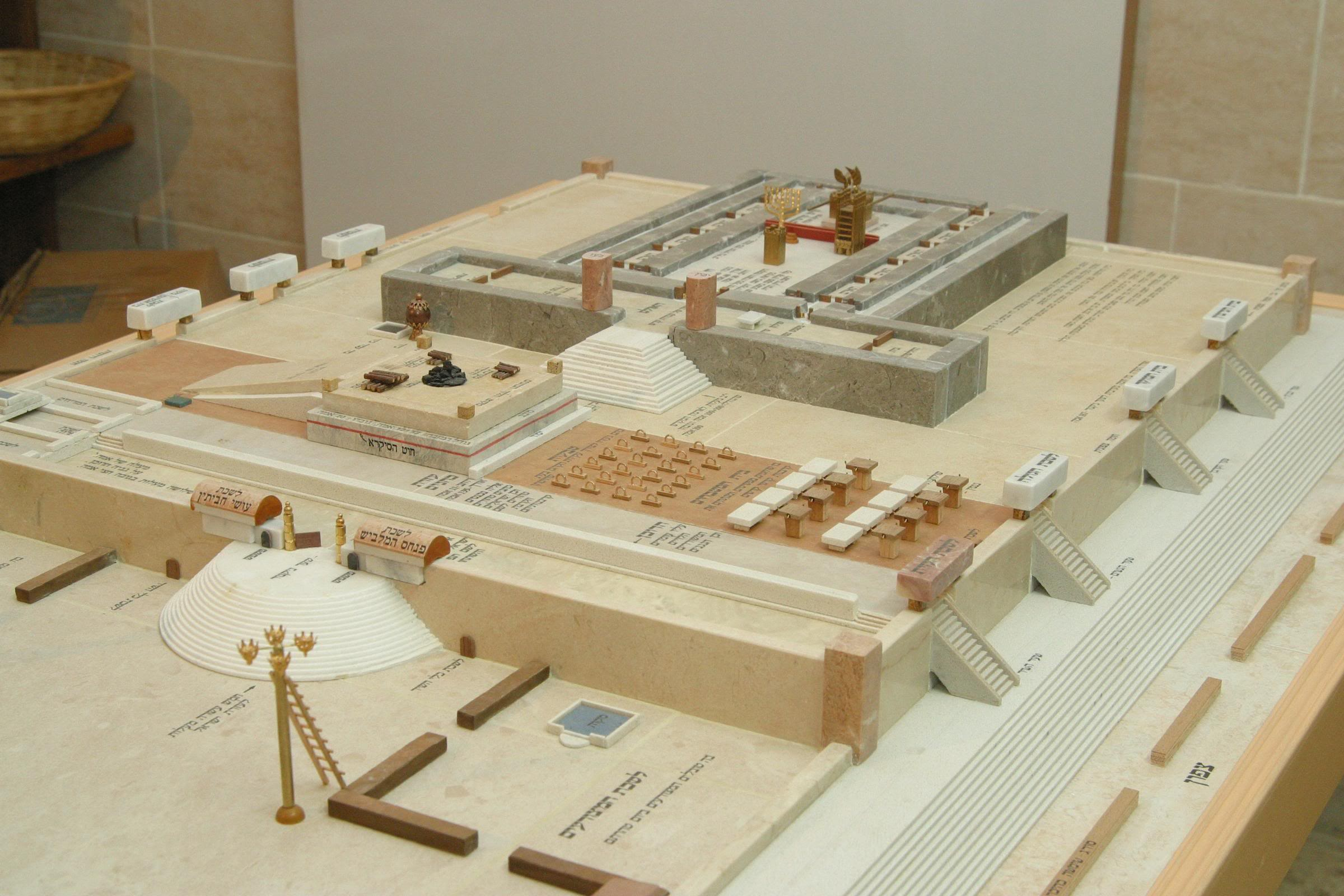 דגם משכן העדות שנוצר על ידי מיכאל אוסניס מקדומים